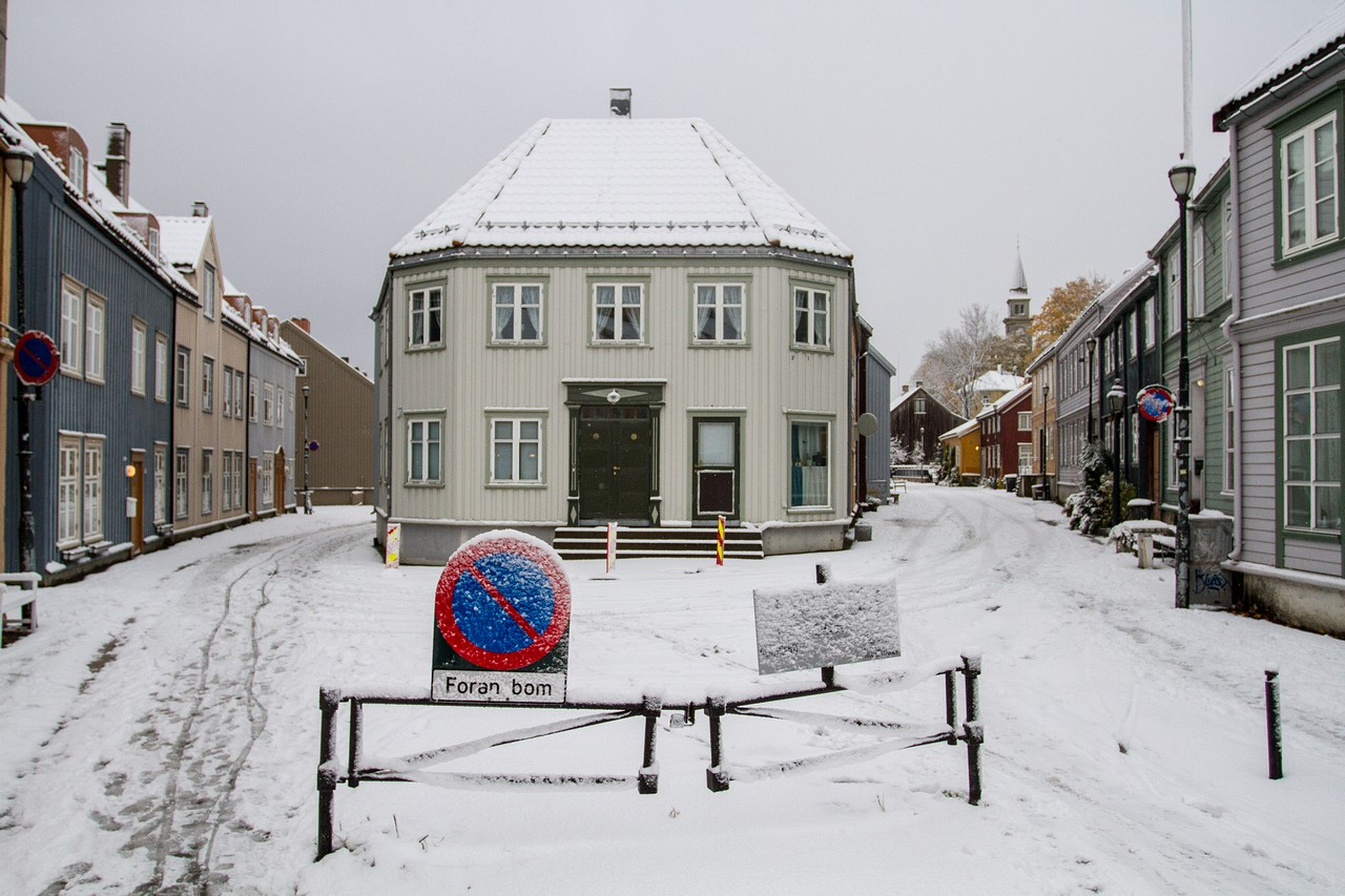 Trondheim